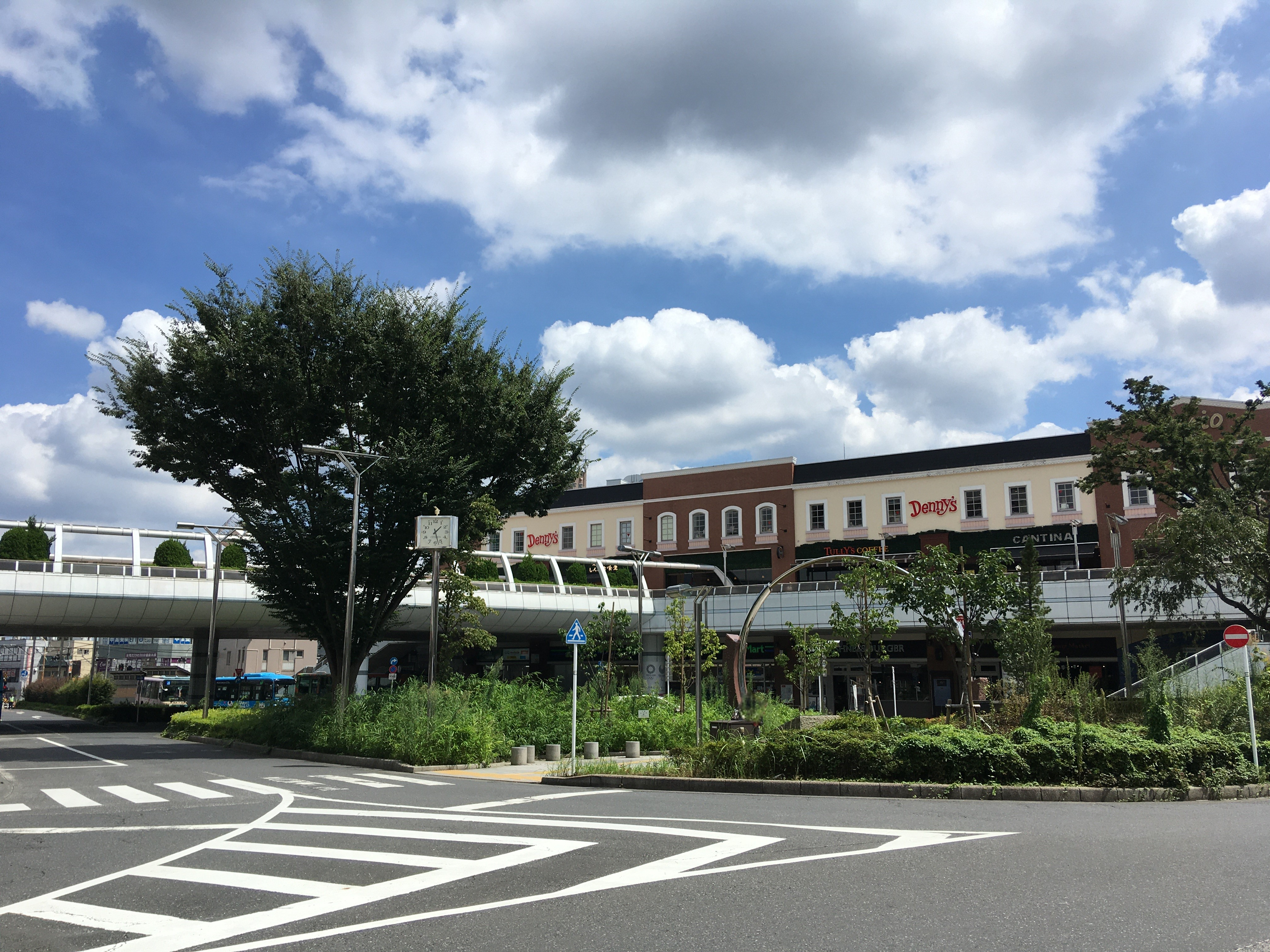 田無駅北口ロータリー